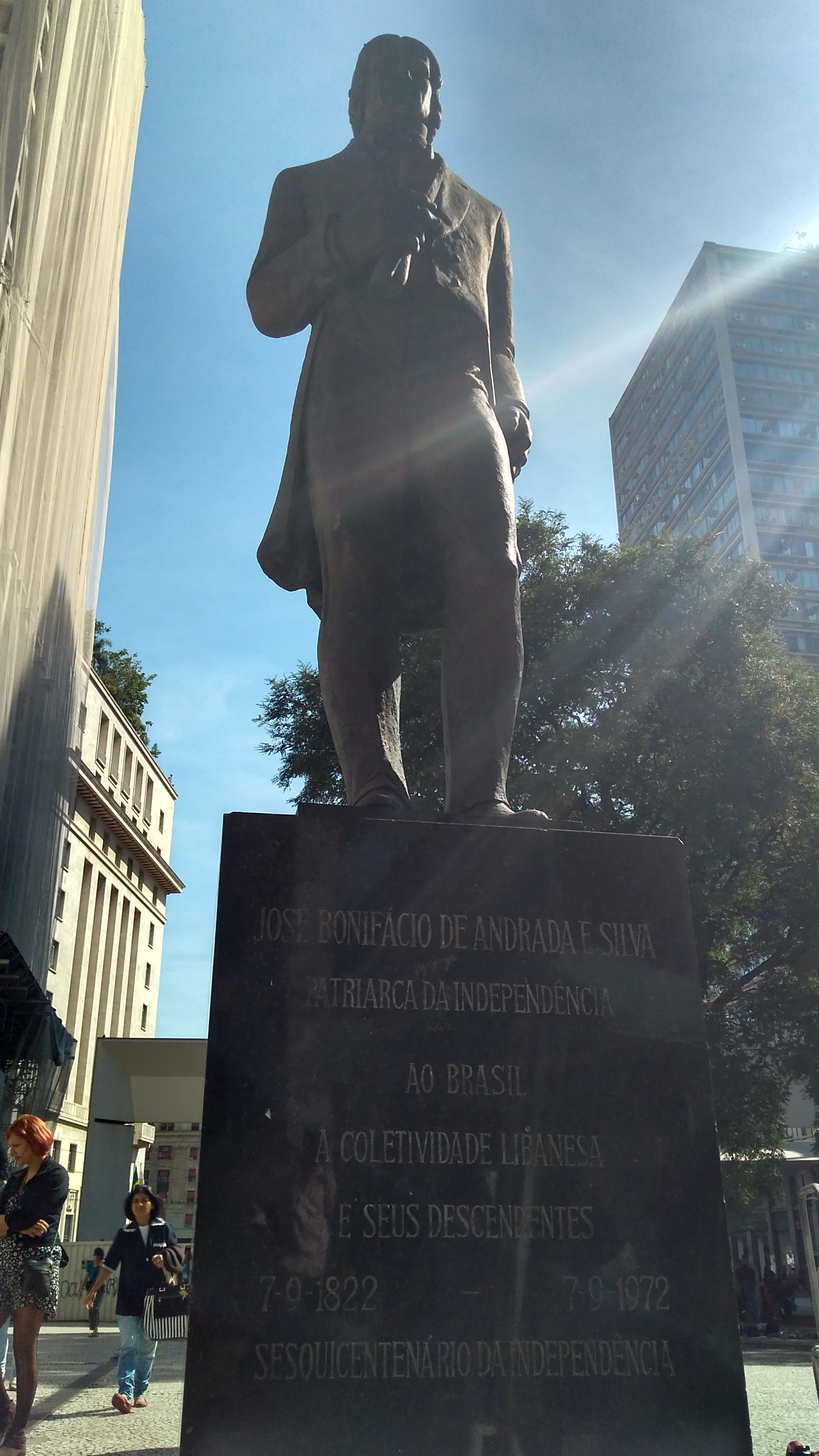 Placa da rua Direita, logradouro do Edifício